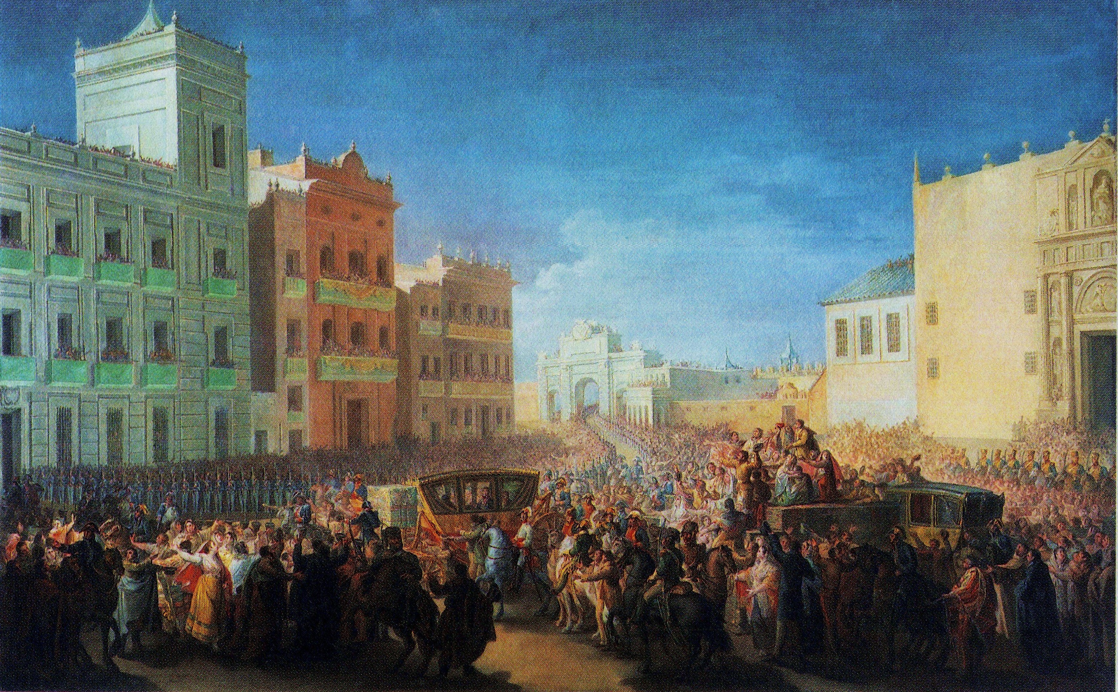 Entrada triomfal de Ferran VII a València, Miquel Parra i Abril (1780-1846).